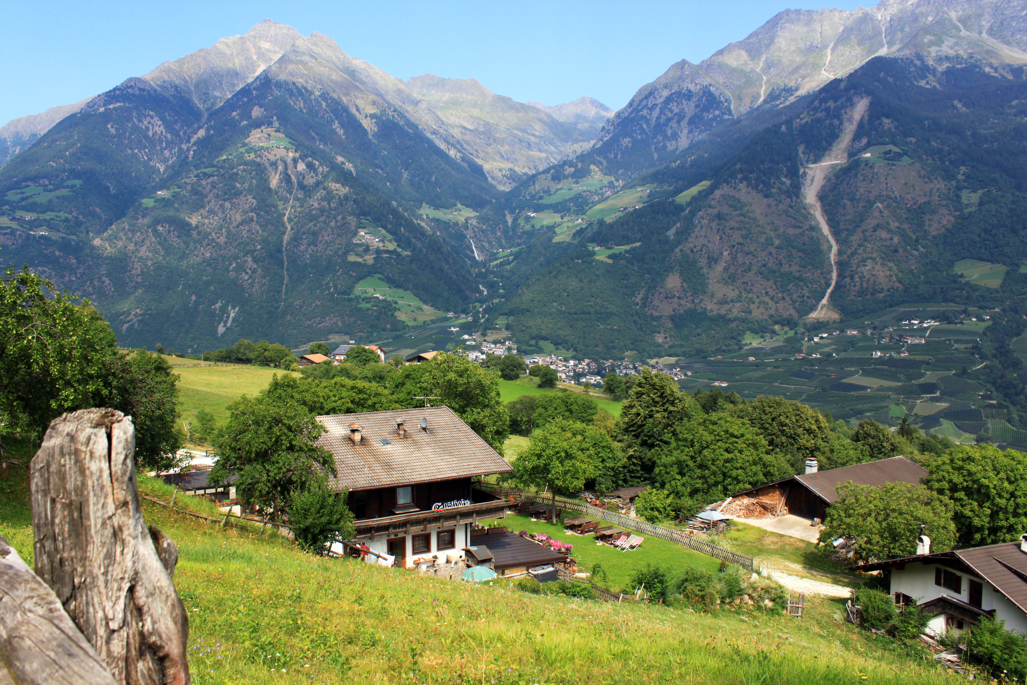 Blick nach Partschins mit Wasserfall und dem Zieltal. Links steht die imposante Zielspitze (3006 m.ü.M.) mit dem Giggelberg (1560 m.ü.M.). Aufgenommen vom Gasthaus Gramegg bei den Quadrathöfen oberhalb von Algund in Südtirol.